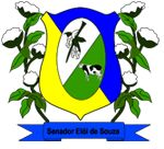 Brasão de Senador Elói de Souza, Rio Grande do Norte, Brasil